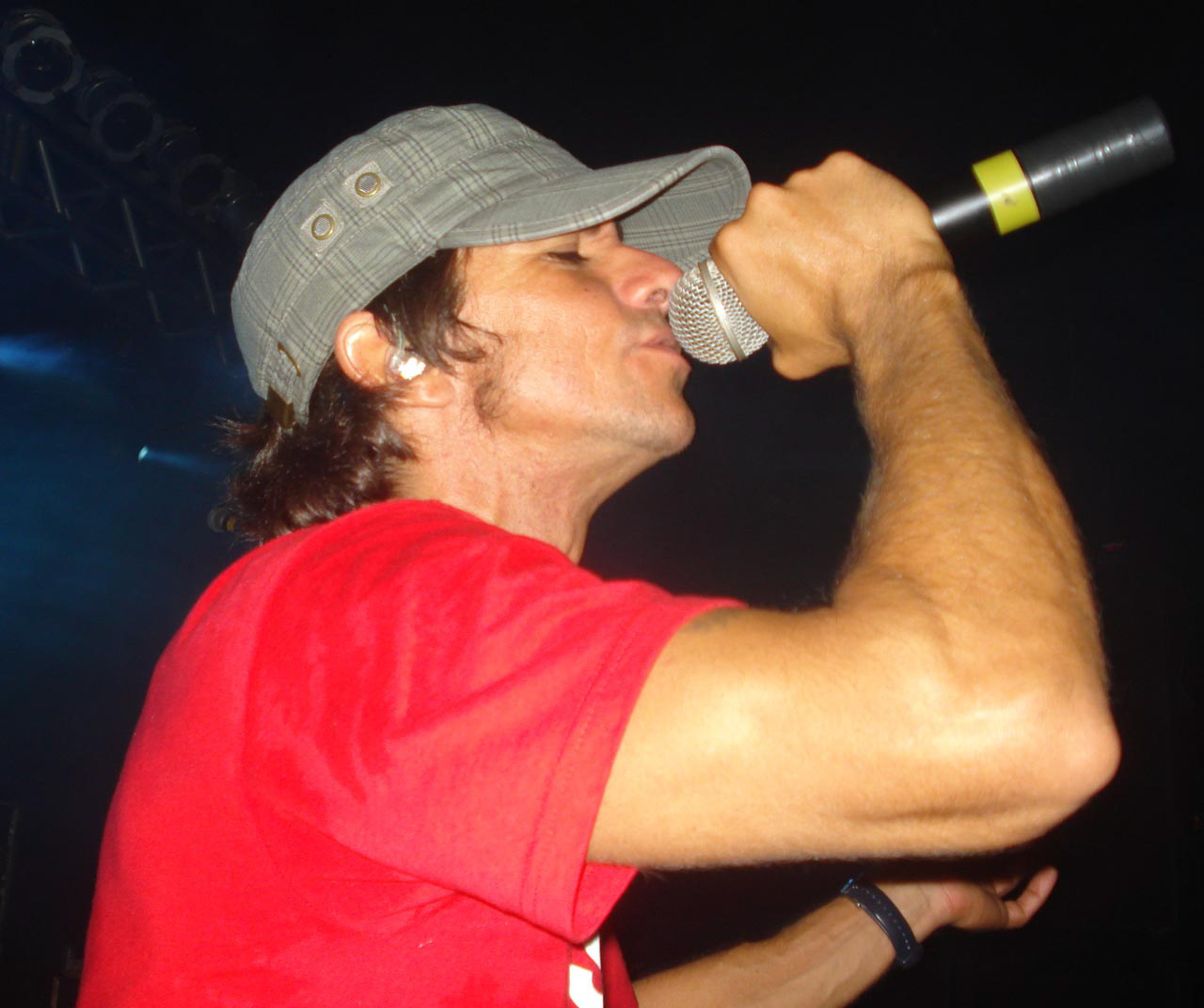 Show Armandinho, 12/06/2008 em Campinas.